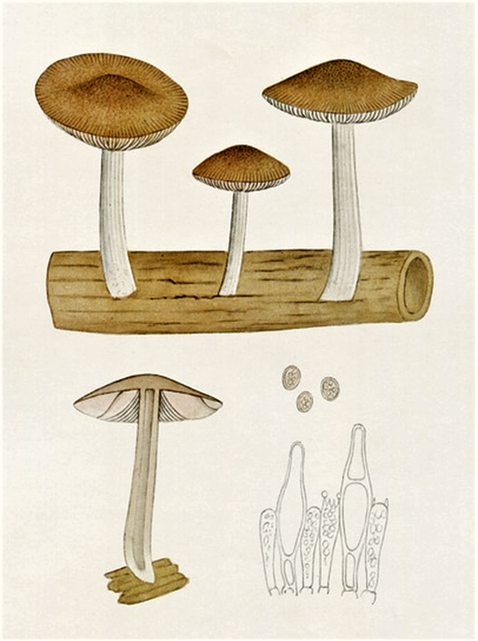 Pluteus granulatus Bres. (1881) [= Pluteus plautus]